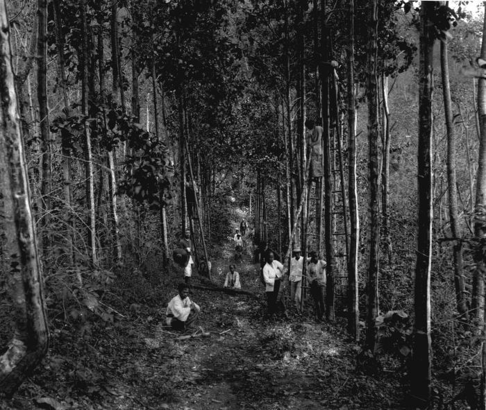 Foto. Kina oogst te Tjipantjoe